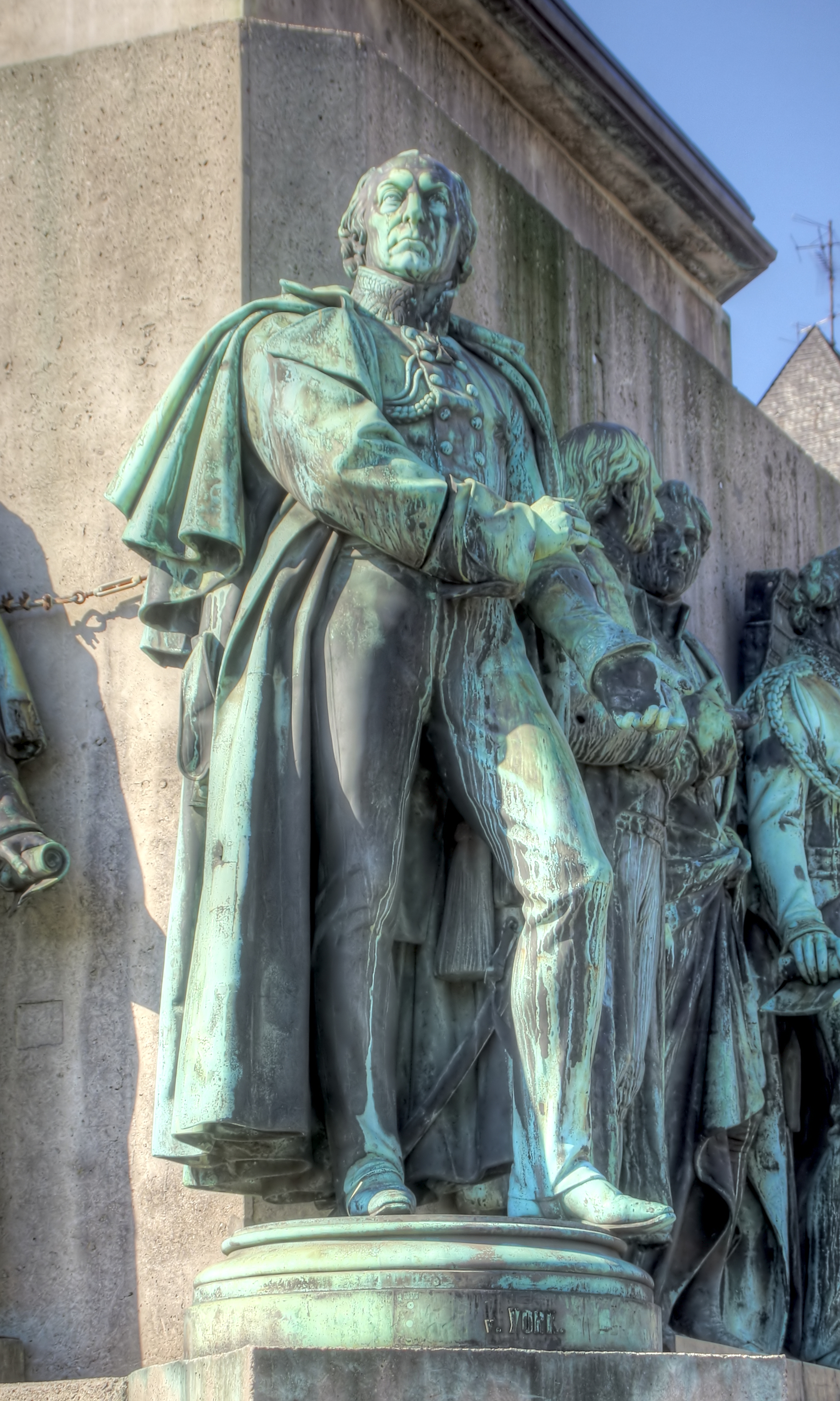 Friedrich Wilhelm III.-Reiterstandbild auf dem Kölner Heumarkt. Detail: Statue des Karl August von Hardenberg